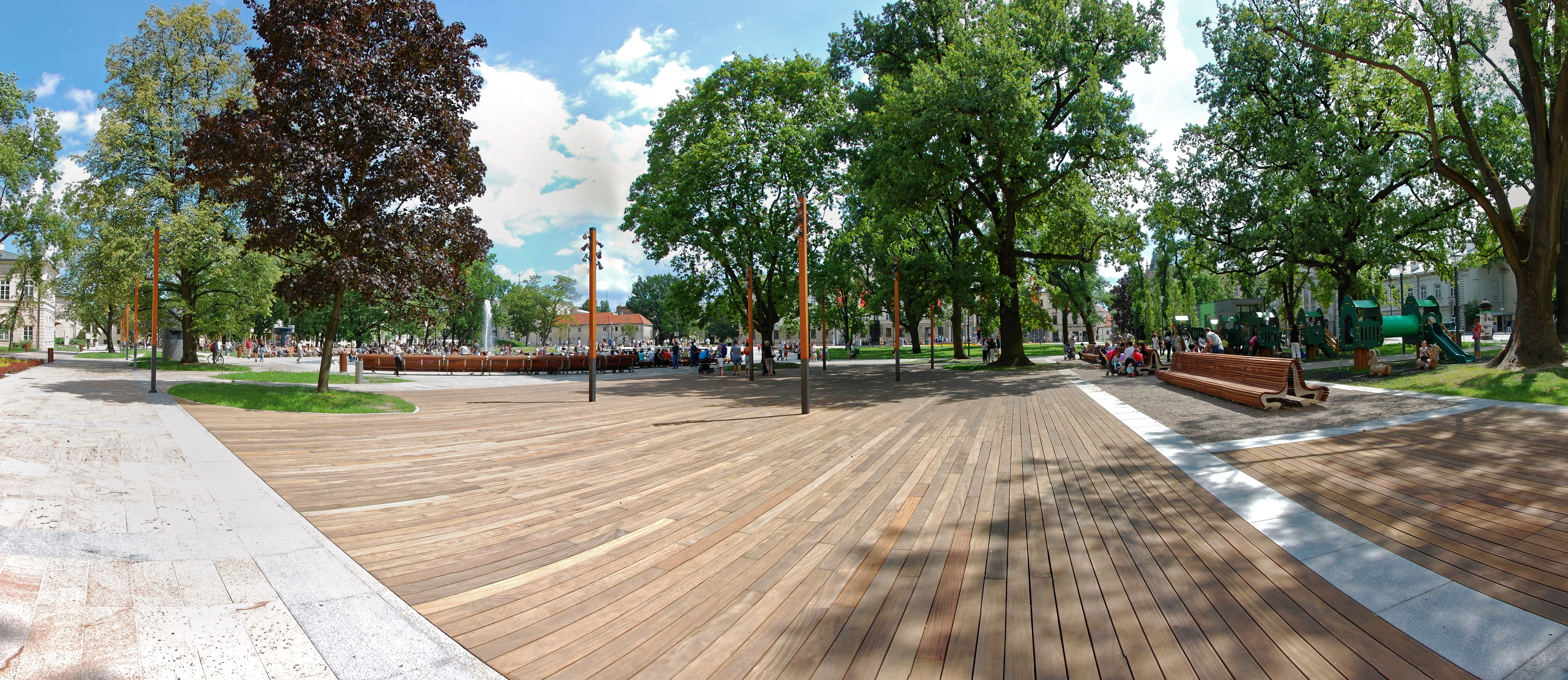 Plac Litewski w Lublinie, część z drewnianą nawierzchnią przeznaczona do tańczenia